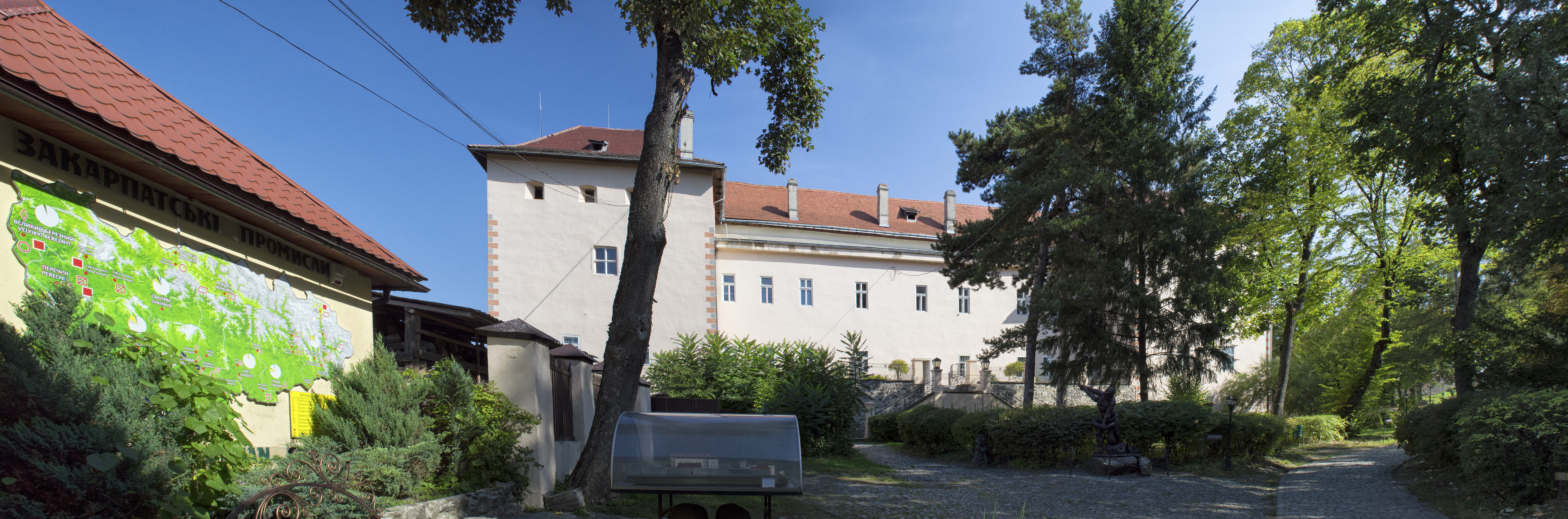 Замок-фортеця (мур.), Ужгород, вул.Капітульна, 33